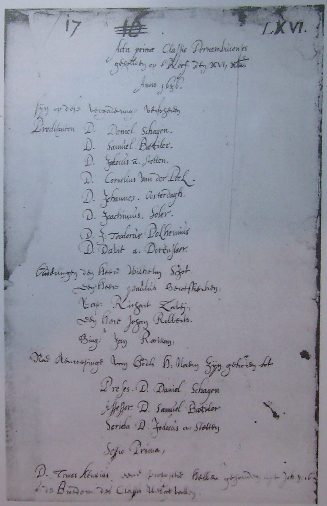 Ata da reunião do Presbitério de Pernambuco, da Igreja Cristã Reformada do Brasil, em dezembro de 1636.